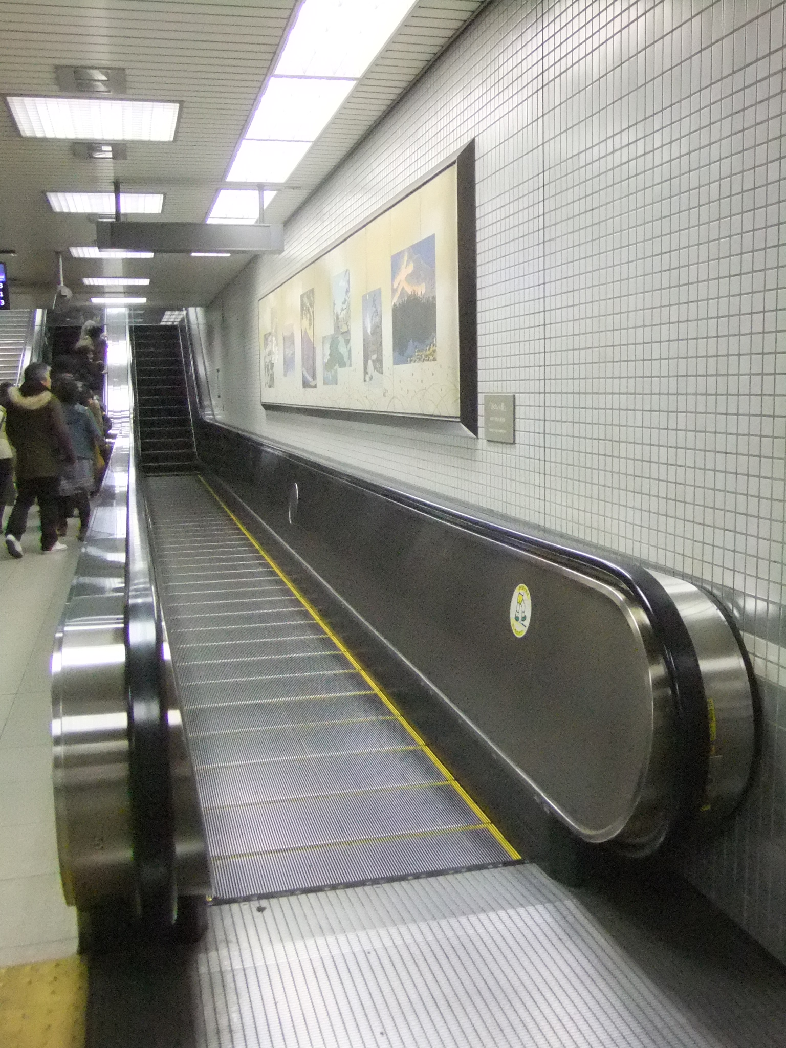 途中からエスカレーターになる動く歩道。 京阪電気鉄道 出町柳駅